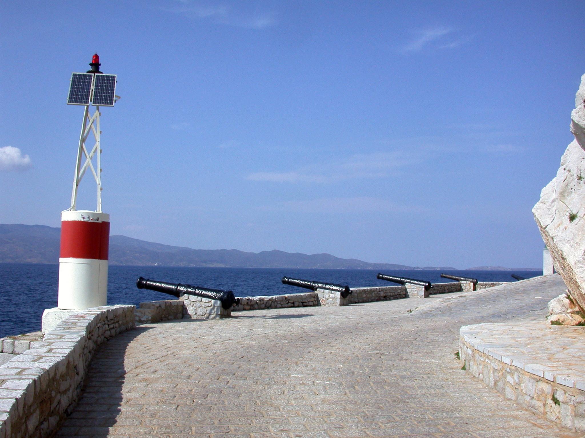 Grecia, isola di Idra, porto di Idra, cannoni sul bastione nord-orientale